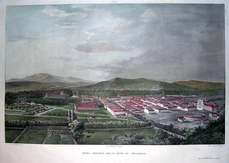 Vista general del Real Sitio de Aranjuez, 1832, de Fernando Brambila.